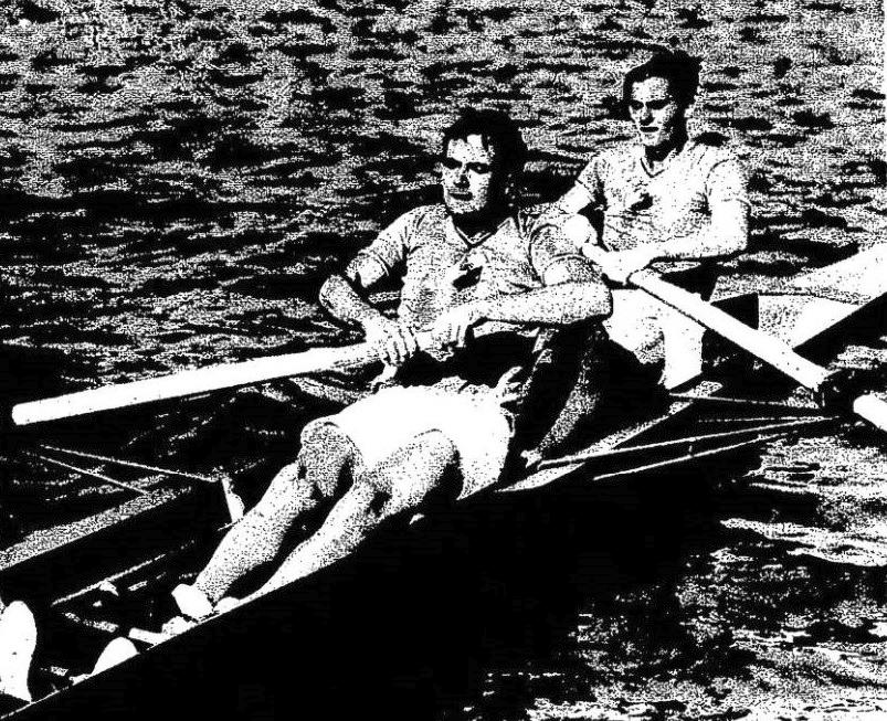 Marceau Fourcade (G.) et Georges Tapie (D.), de Bône, troisième aux JO de 1936 en deux avec barreur.